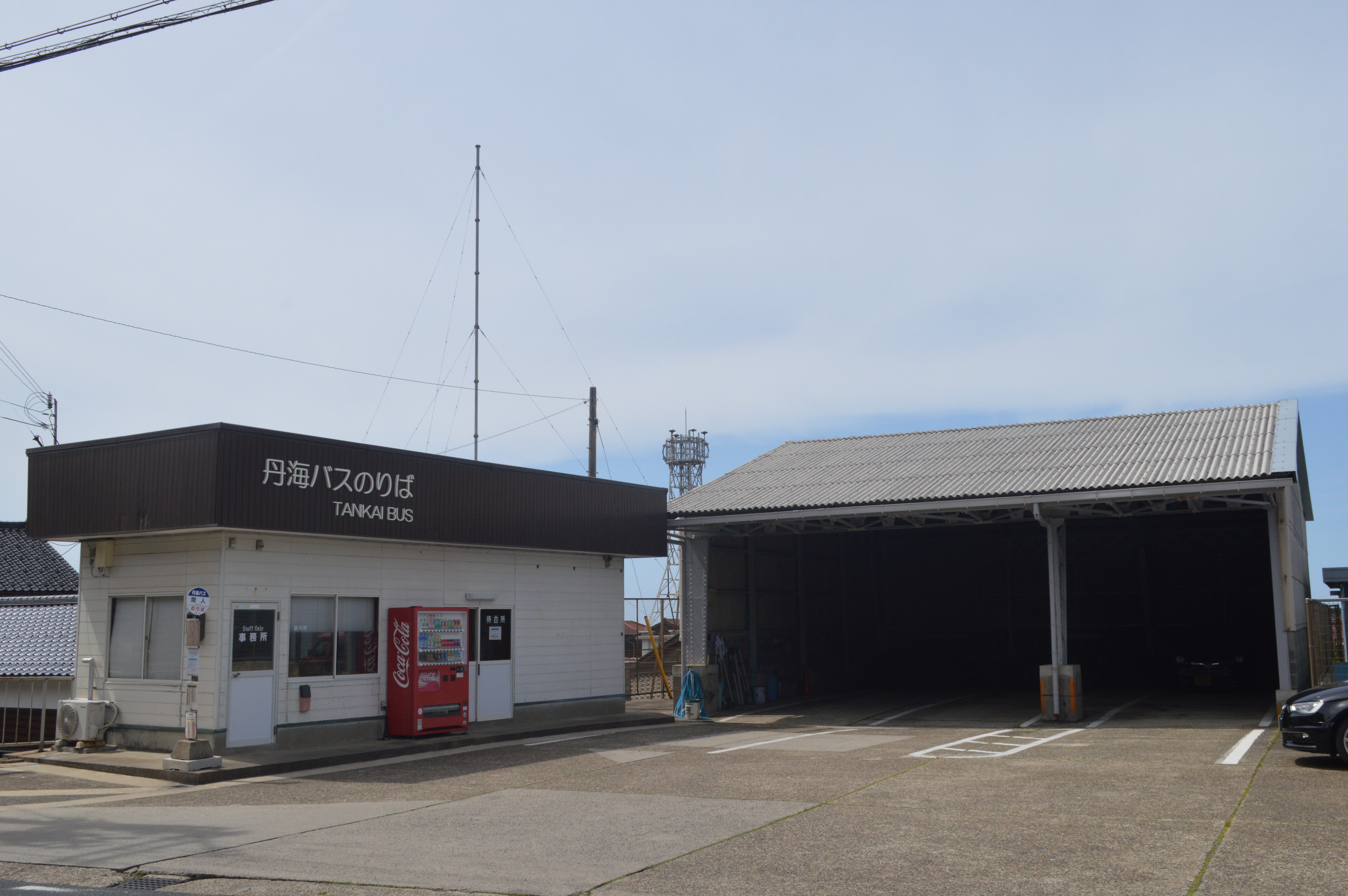 京都府京丹後市丹後町間人にある丹海バス間人バス停。